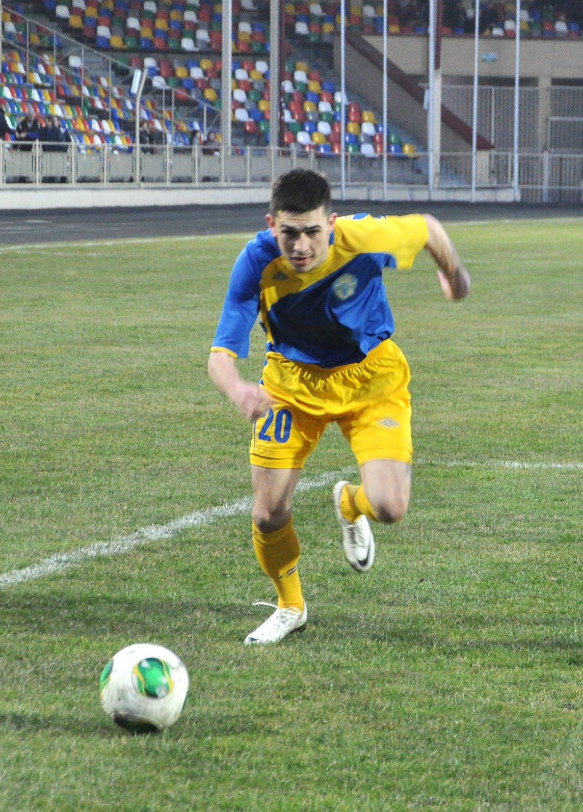 Матч 18-го туру чемпіонату України з футболу 2014—2015: перша ліга між ФК «Тернопіль» та МФК «Миколаїв» на тернопільському міському стадіоні 20 березня 2015 року. Під номером 20 грає нападник ФК «Тернопіль» Ростислав Волошинович.